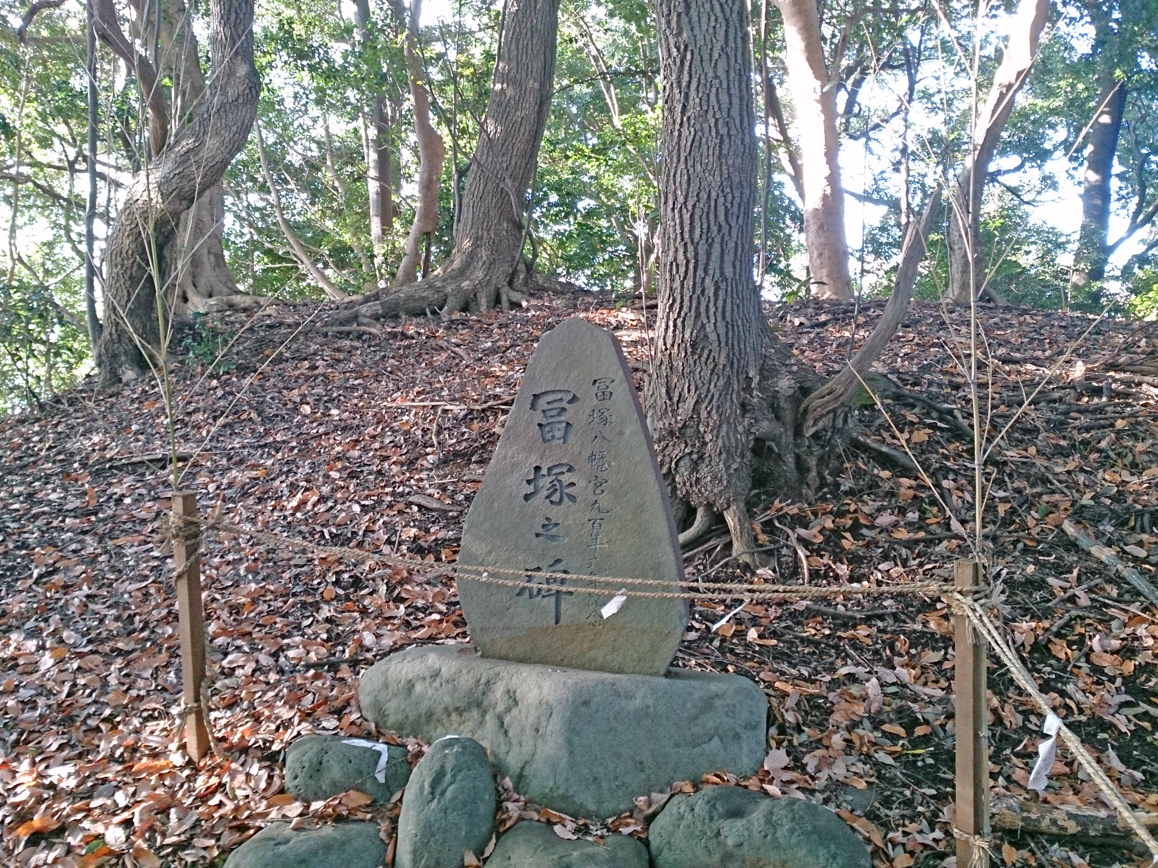 戸塚区戸塚町所在の富塚古墳近景